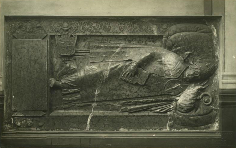 Беларуская (тарашкевіца): Надмагільле Паўла Гальшанскага (Pavał Halšanski)